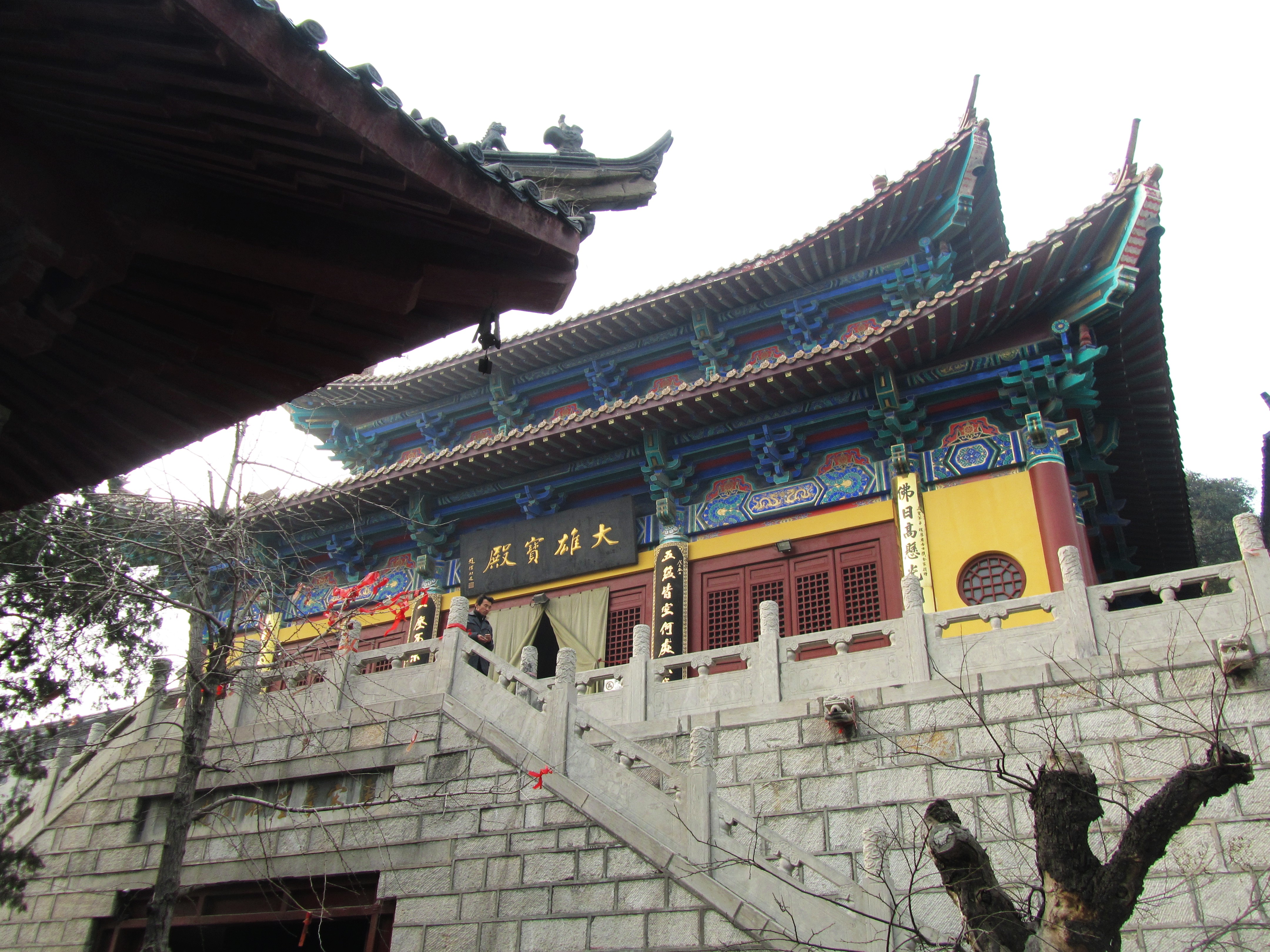 徐州兴化禅寺，大雄宝殿。